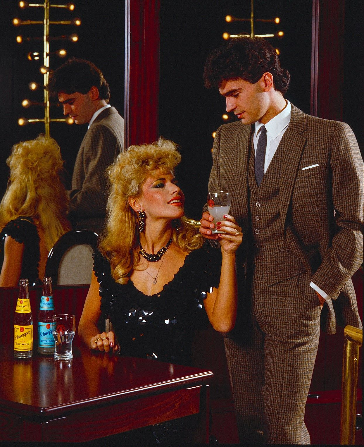 Bíró Ica és Frei Mihály egy Schweppes-reklámfotón